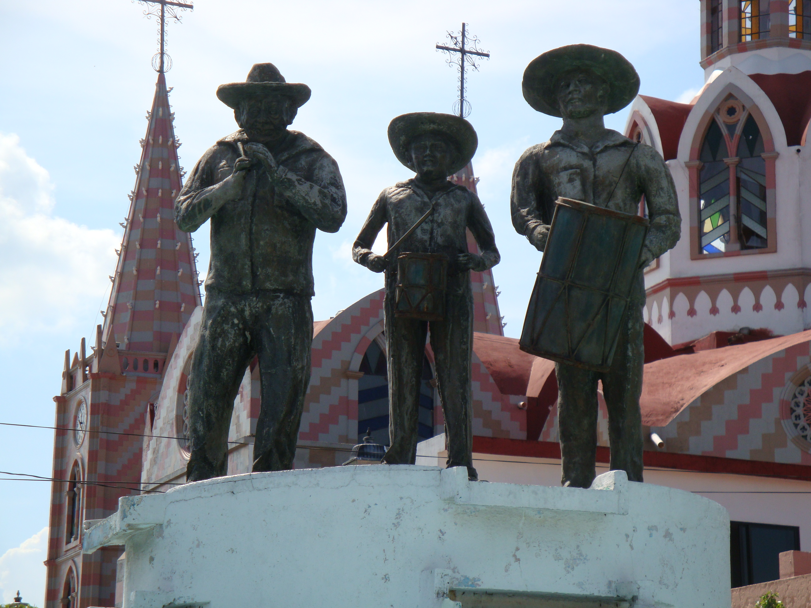 Monumento a los tamborileros, en la ciudad de Nacajuca, estado de Tabasco, México.